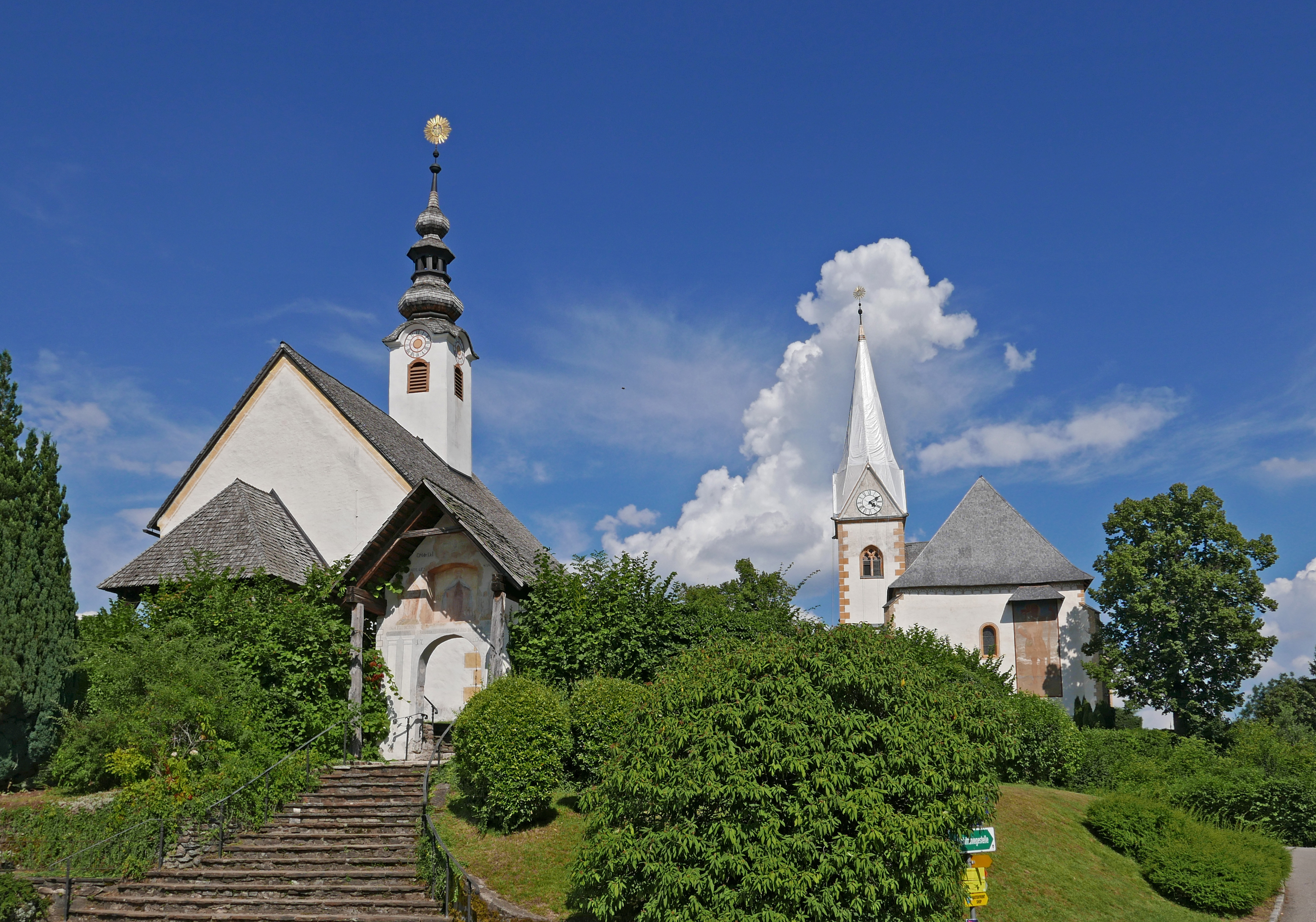 Kath. Pfarrkirche St. Primus und Felicianus in Maria Wörth und die Winterkirche (links)